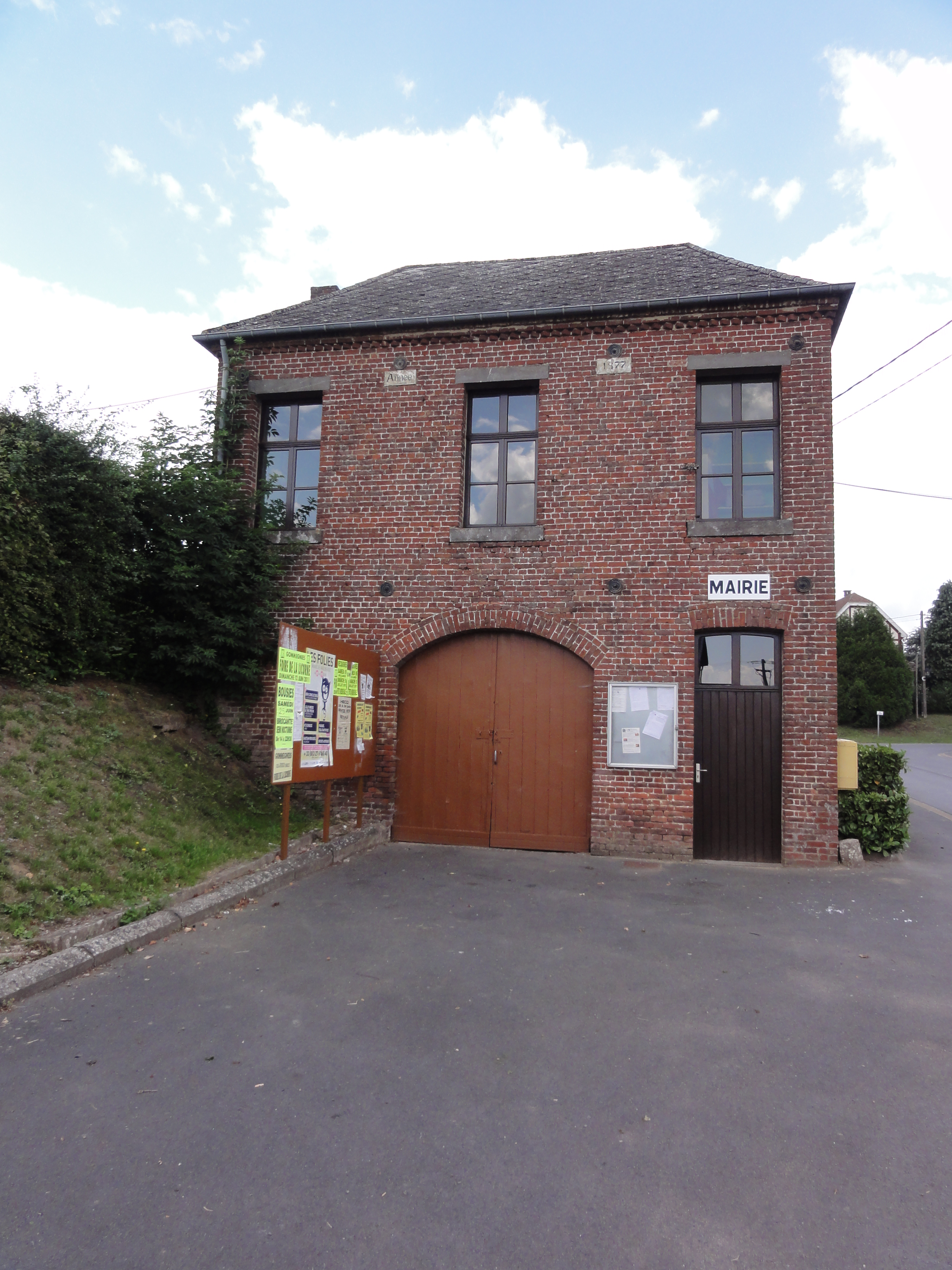 Robersart (Nord, Fr) mairie